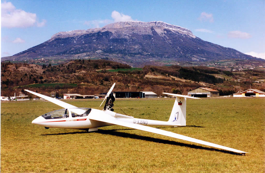 Selflaunching glider Glaser Dirks DG 500M22, photographer Günter Gesierich Location: Gap/Tallard LFNA Background mountain: Grand Seuze